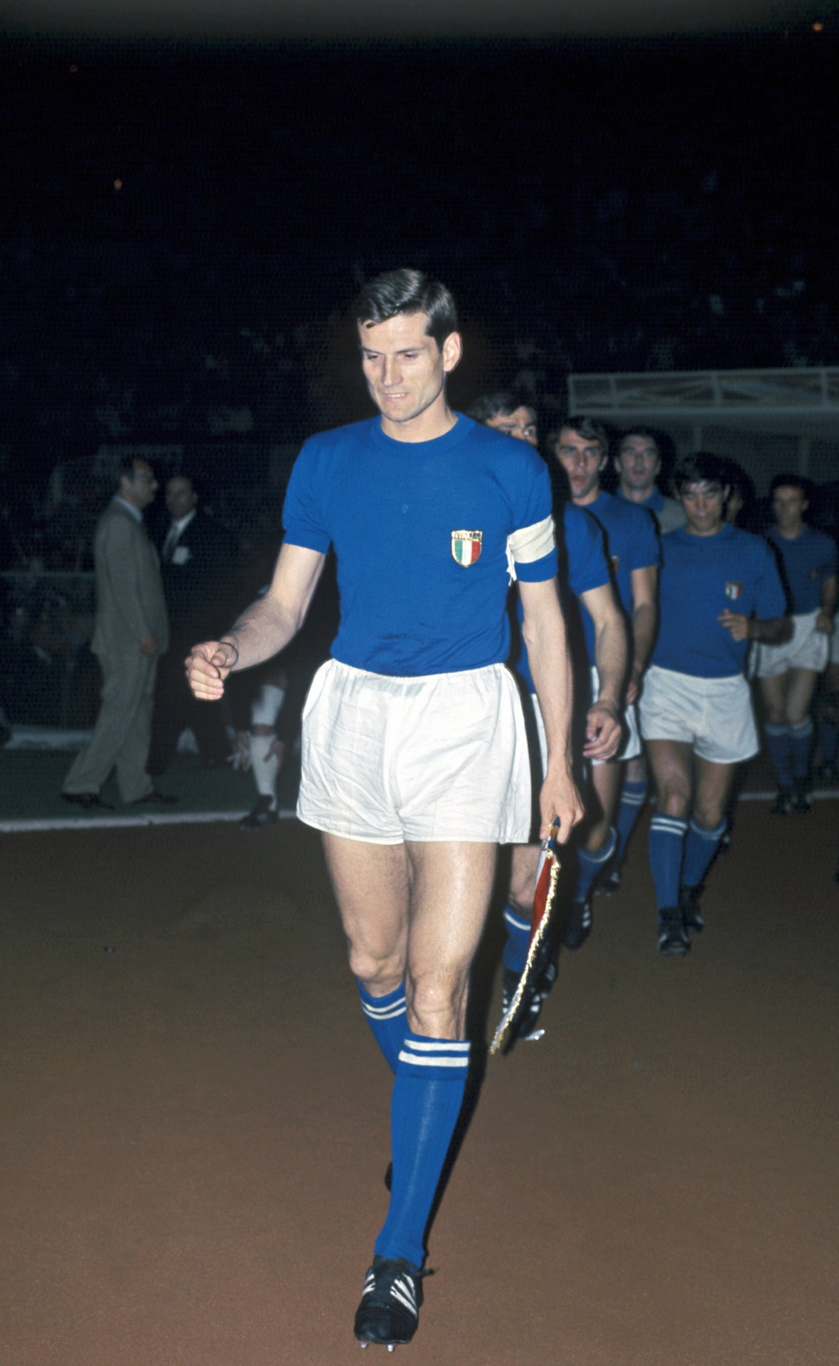 Roma, stadio Olimpico, giugno 1968. Giacinto Facchetti, capitano dell', guida in campo la squadra azzurra in una delle due partite di finale del contro la